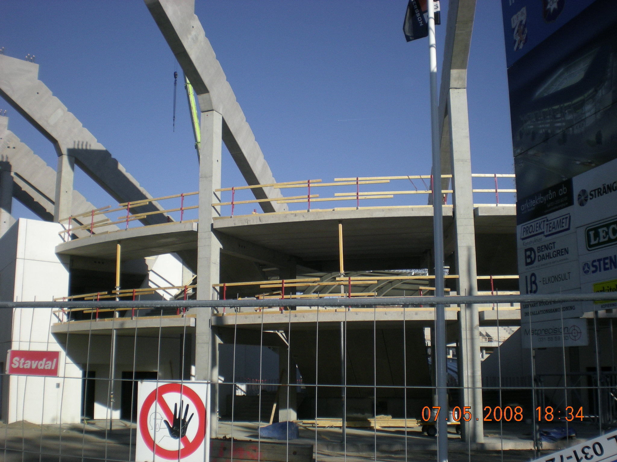 Nya-gamla Ullevi under ombyggnad